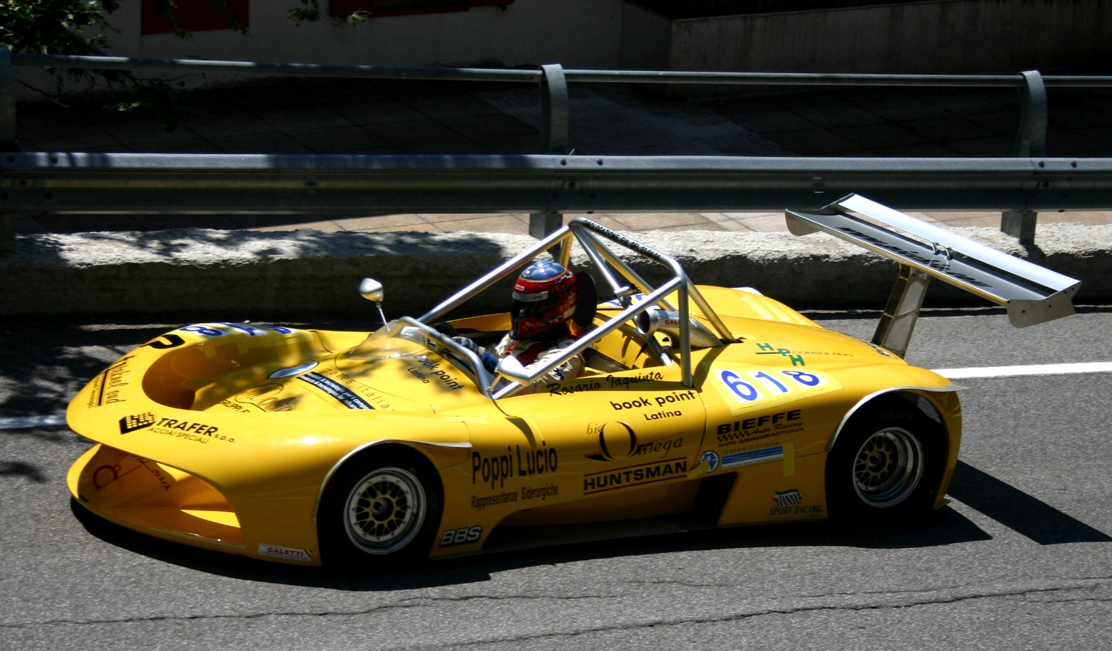 Una Picchio Honda ripresa alla Coppa Carotti (3.7.04) Foto scattata da me al Terminillo durante la Coppa Carotti (3.7.04)